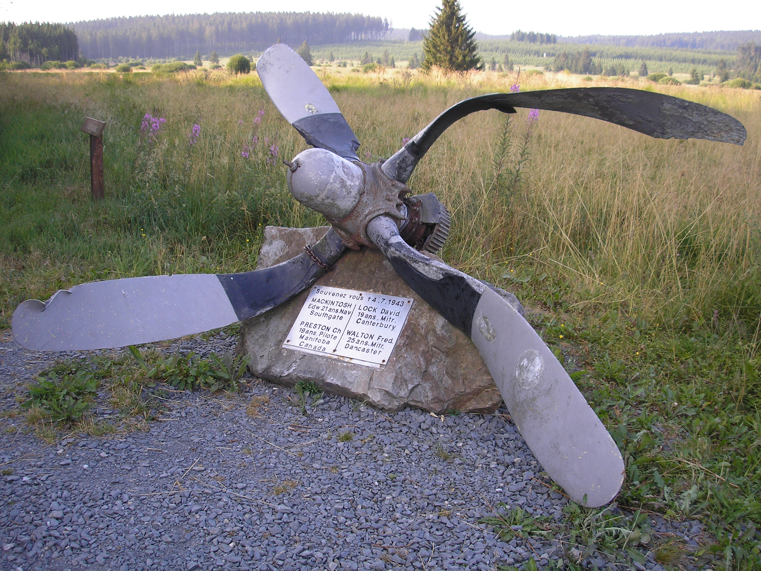 II. Weltkrieg Erinnerung in Sourbrodt, Ost-Belgien